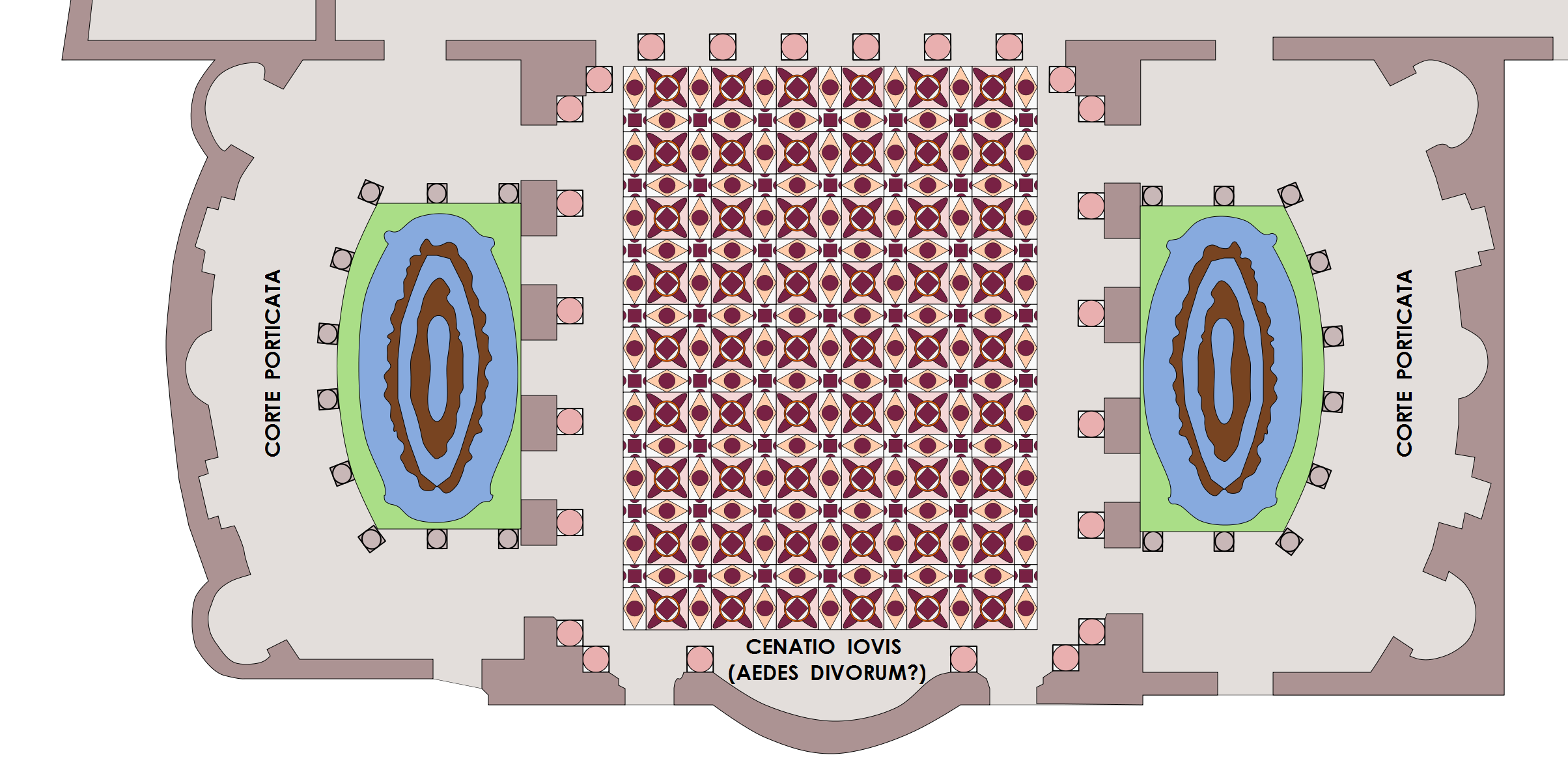 Pianta della parte meridionale della domus Flavia di Domiziano (Roma - Palatino; 81-92 AD); architetto Rabirio. Questa parte è stata denominata anche triclinium ovvero cenatio Iovis